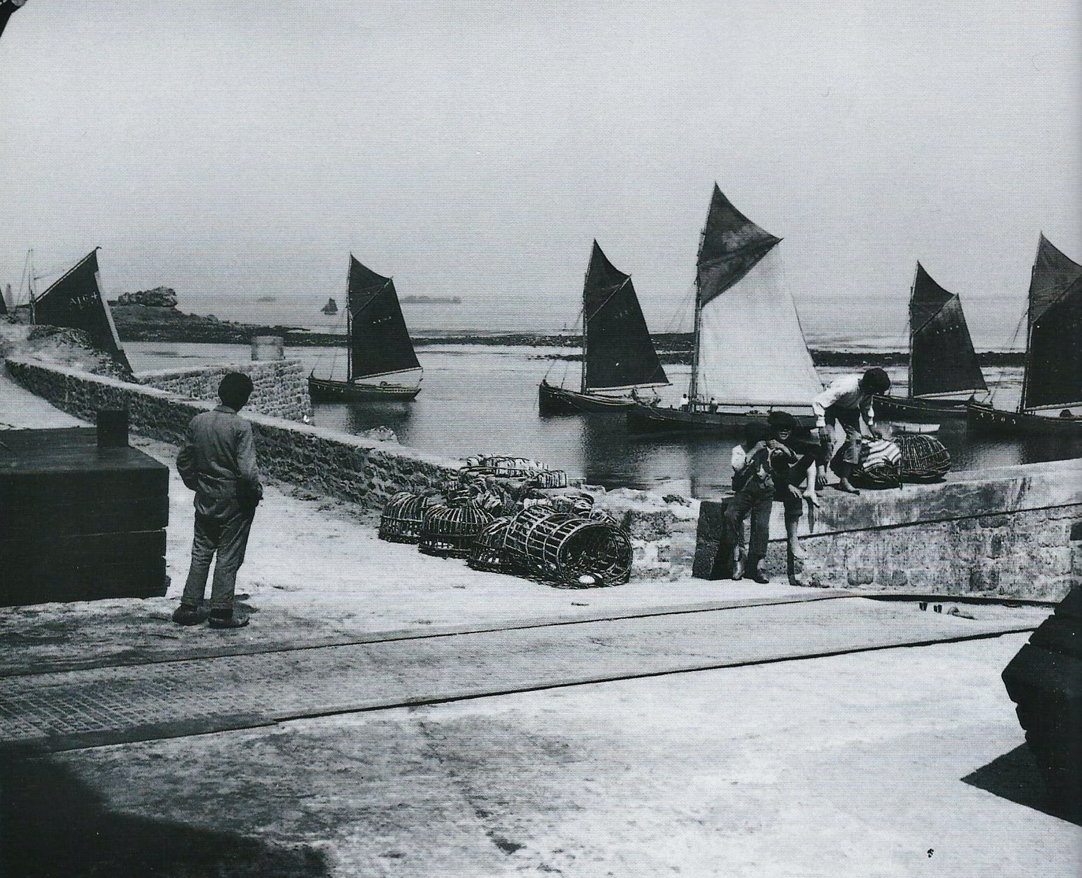 Sloups au mouillage à l'Île de Sein, ainsi qu'une gabare |le bateau à voile blanche] et des casiers à homards (photographie de Jacques de Thézac, vers 1930).